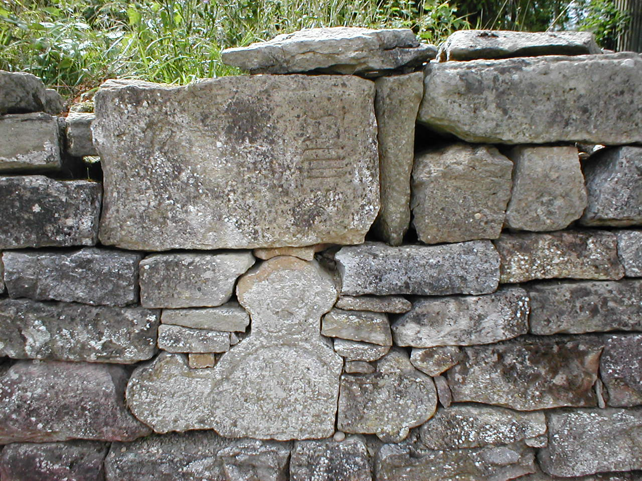 Trockenmauer mit Fragmenten historischer Grabsteine an der aus dem 10. Jhd. stammenden Bergkirche in Heinsheim